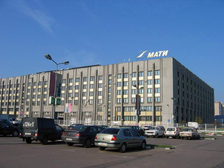 Москва, Оршанская улица, дом 3. Здание Российского государственного технологического университета имени К. Э. Циолковского.